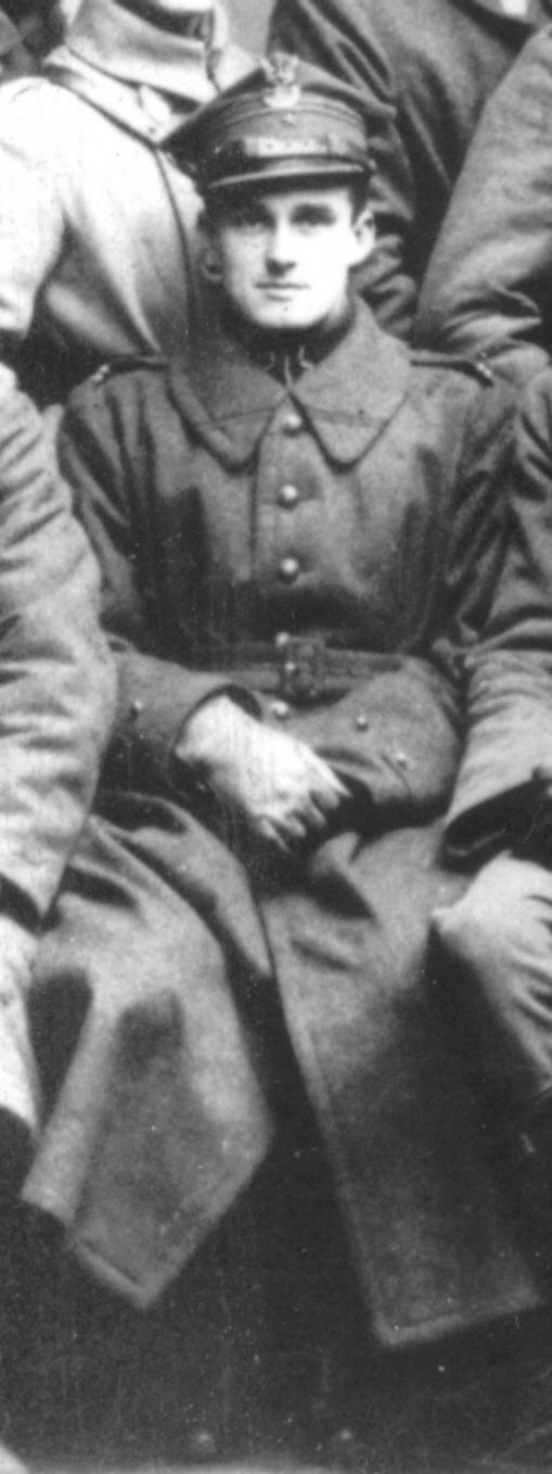 Adam Bratro